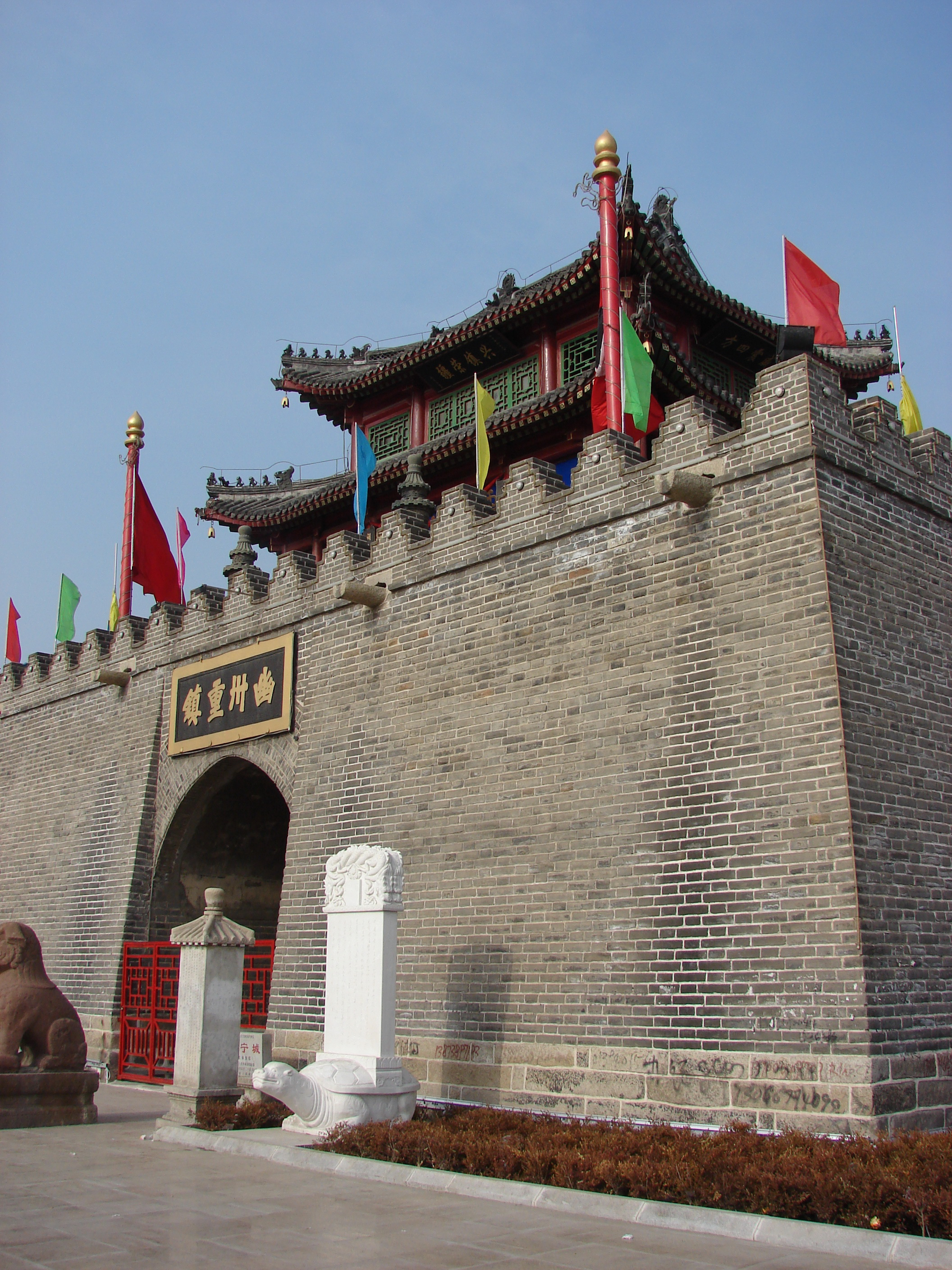 辽宁省北镇市鼓楼，南门上题“幽州重镇”四字。